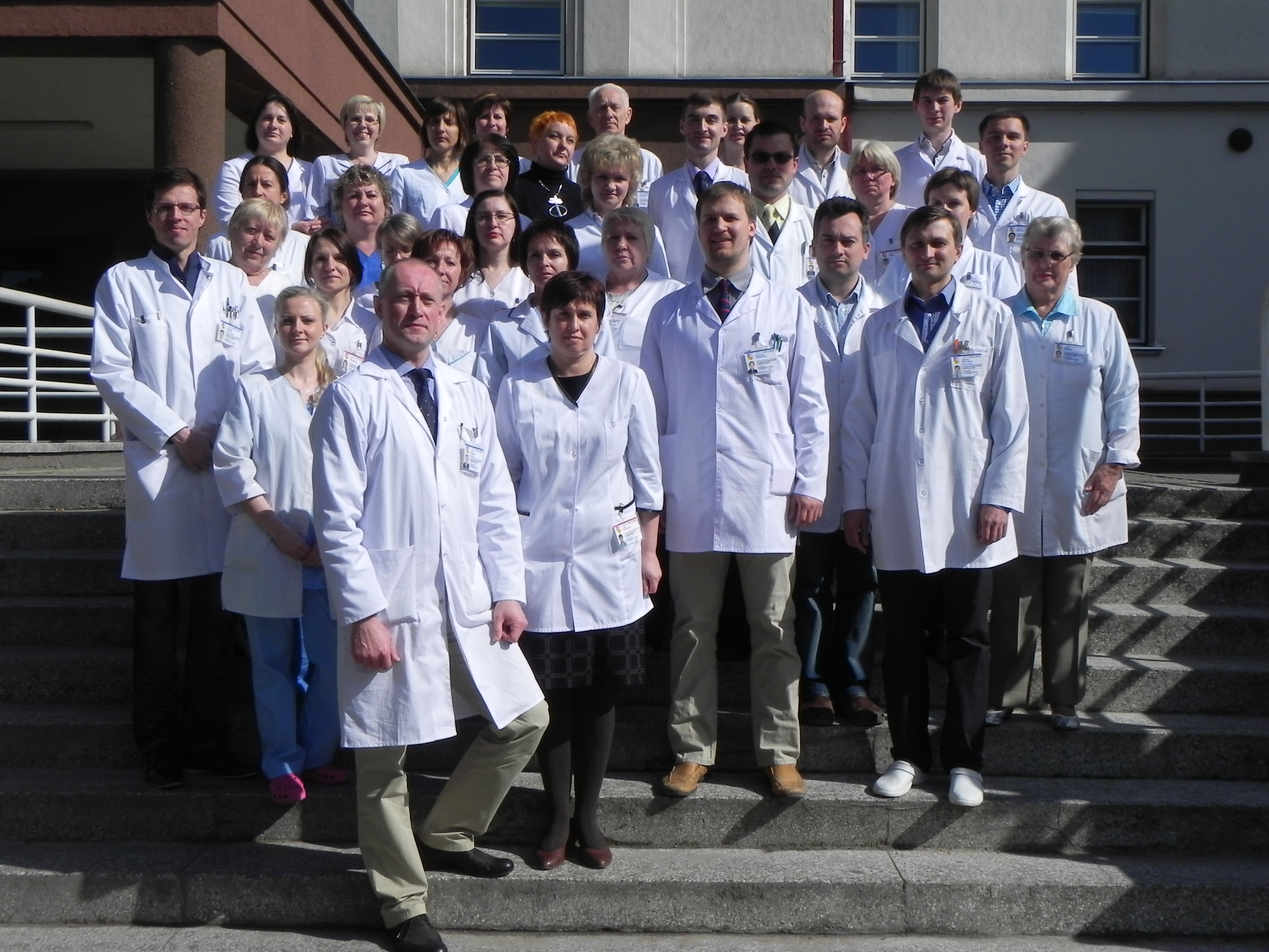 Rytis Rimdeika su LSMUL Plastinės chirurgijos ir nudegimų skyriaus kolektyvu 2012 m.